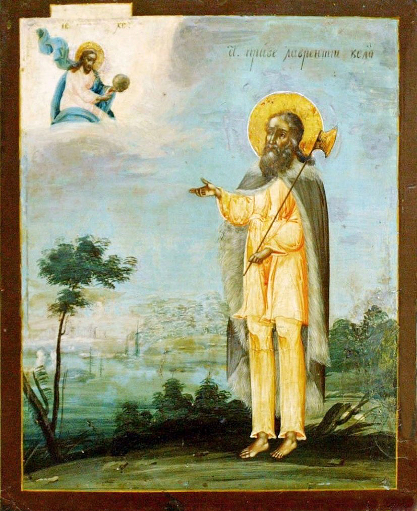 Блж. Лаврентий Калужский. Икона. Калуга. 1-я половина XIX века. 24.4 х 20.2. Церковно-Археологический Кабинет Московской Духовной Академии.